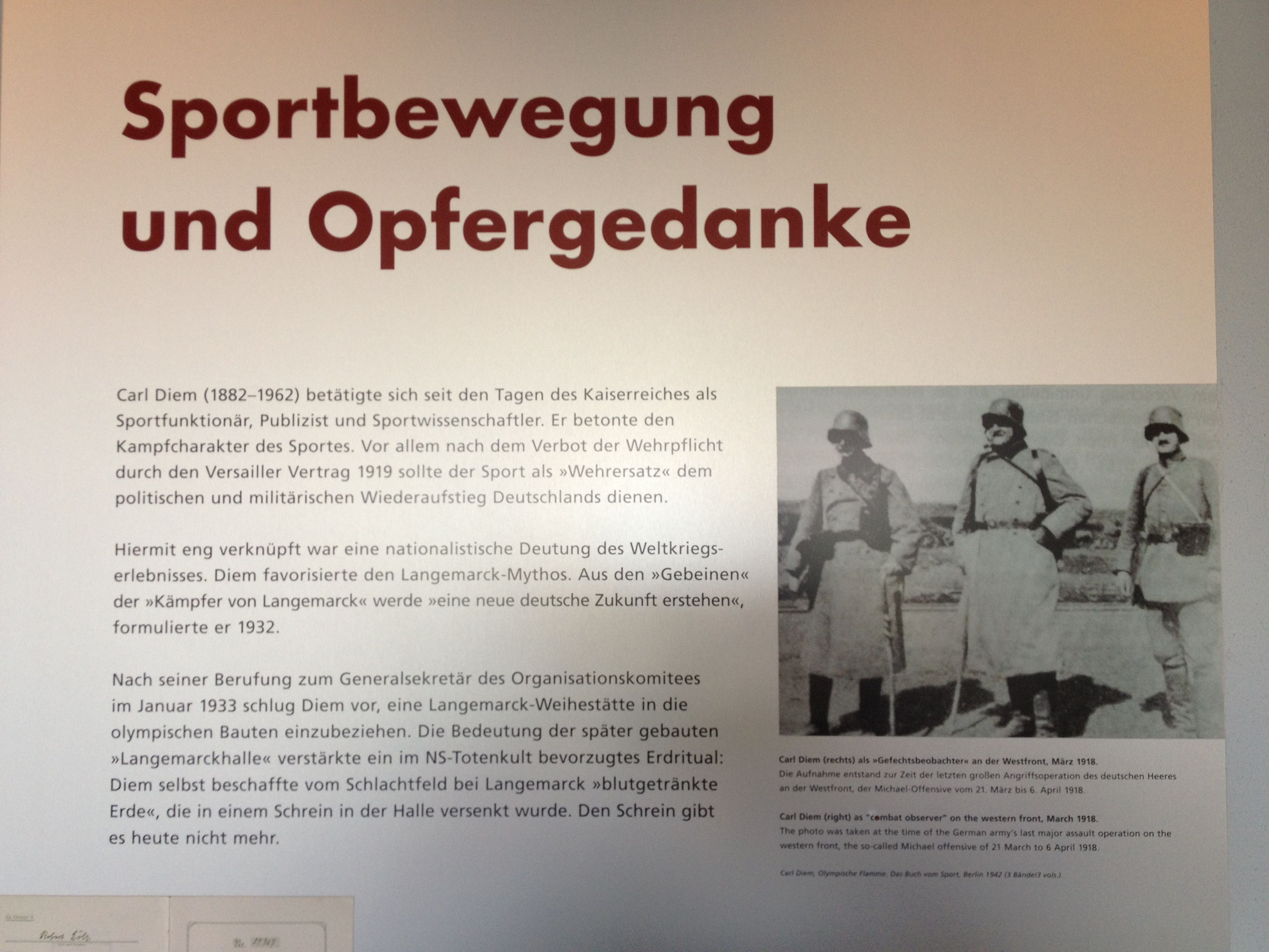 Die Sportbewegung von Carl Diem